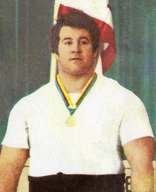 MUNCHEN/MONACO '72-PANINI-Figurina n.52- PATERA - USA -SOLLEVAMENTO PESI-Rec